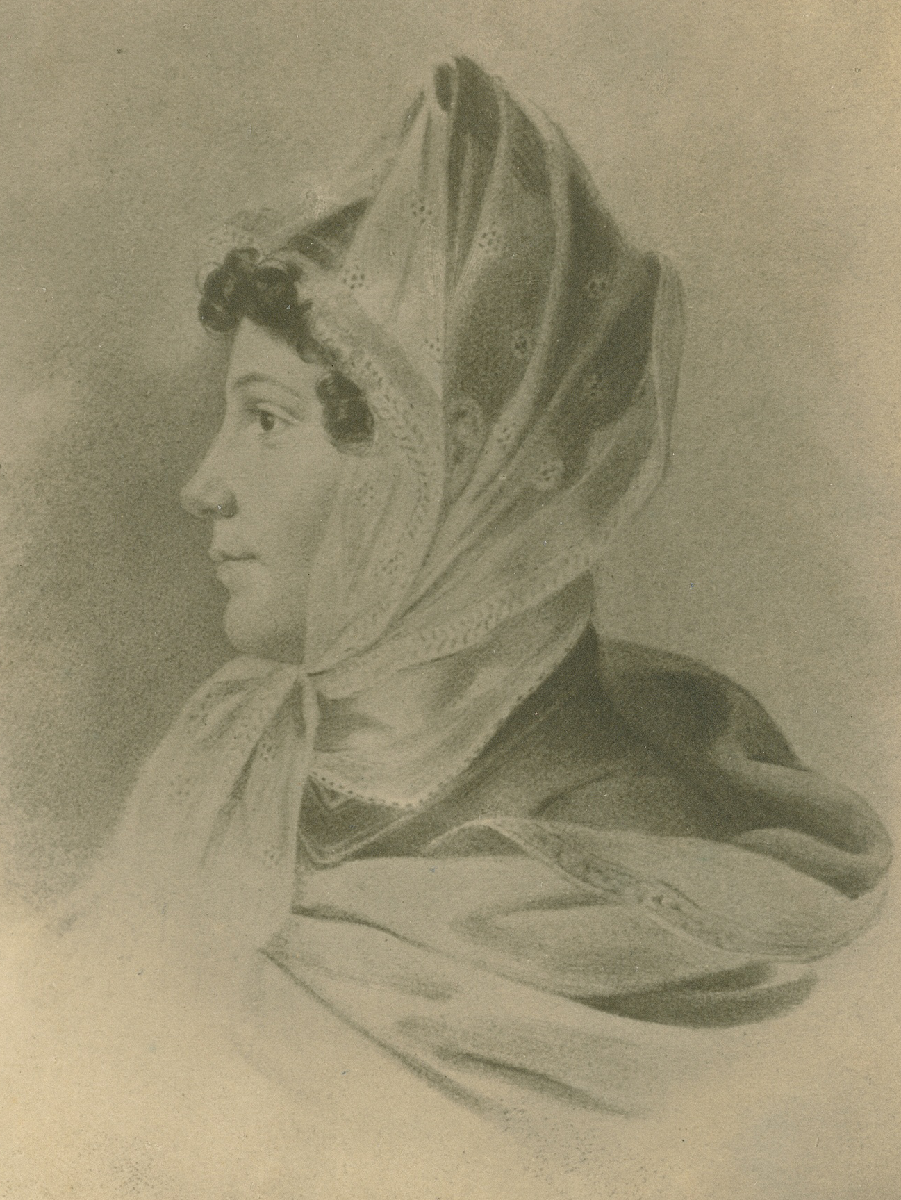 Giulietta Guicciardi (1782-1856), Heliogravüre einer anonymen Zeichnung oder Lithographie des 19. Jahrhunderts